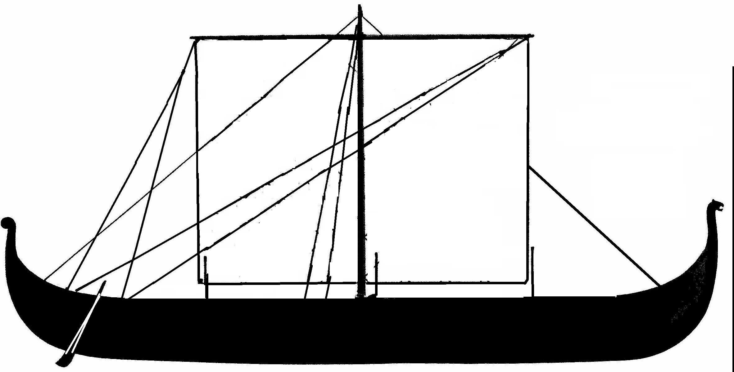 eigen tek.